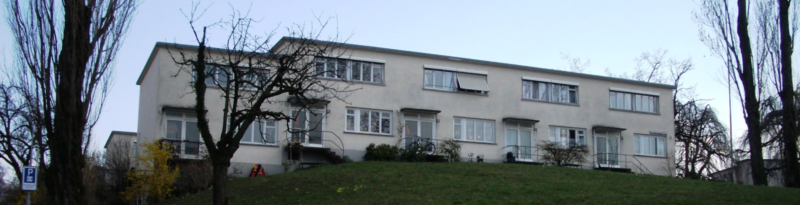 Zurich, Switzerland self-made, March 2007